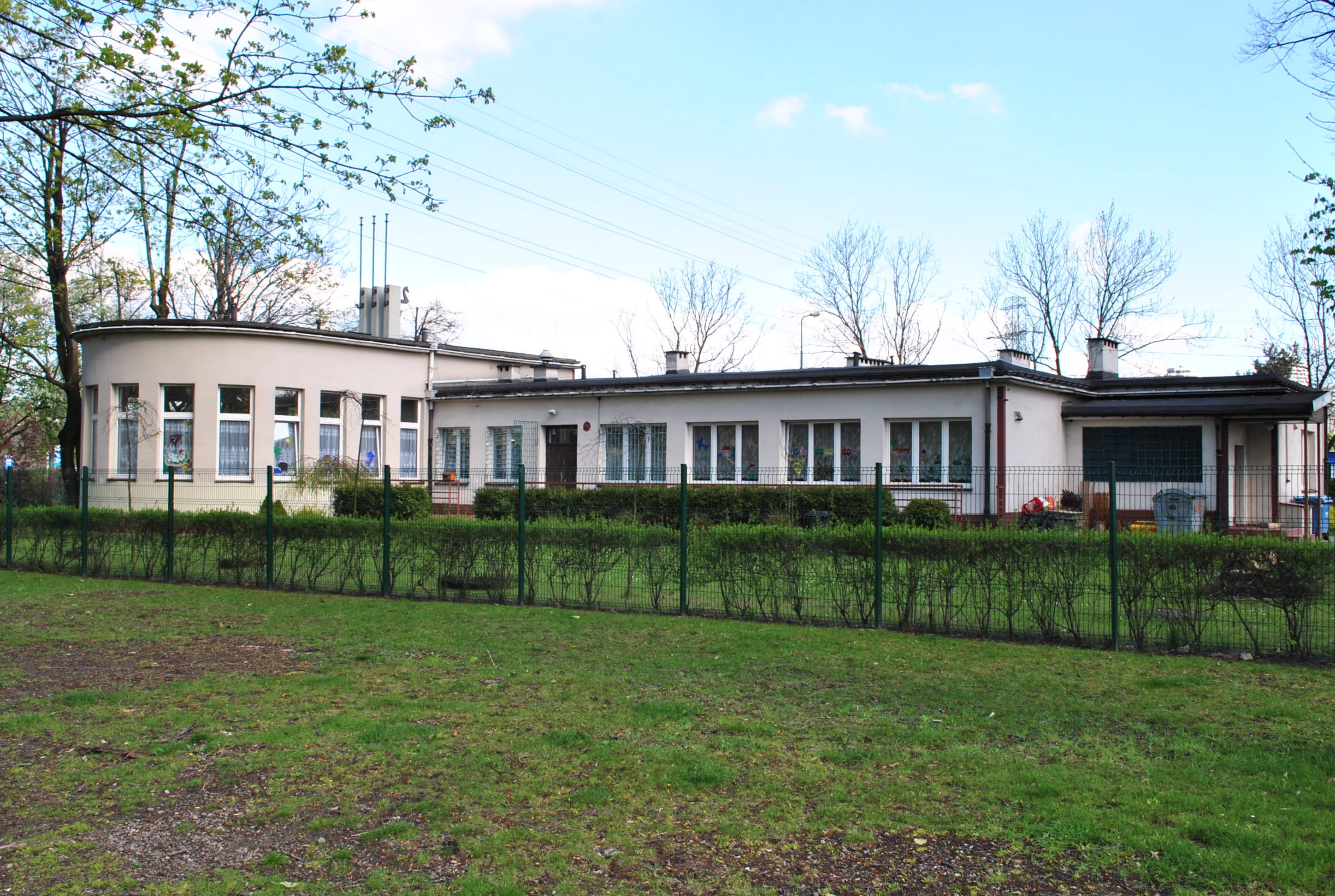 Katowice - Załęże. Przedszkole nr 39